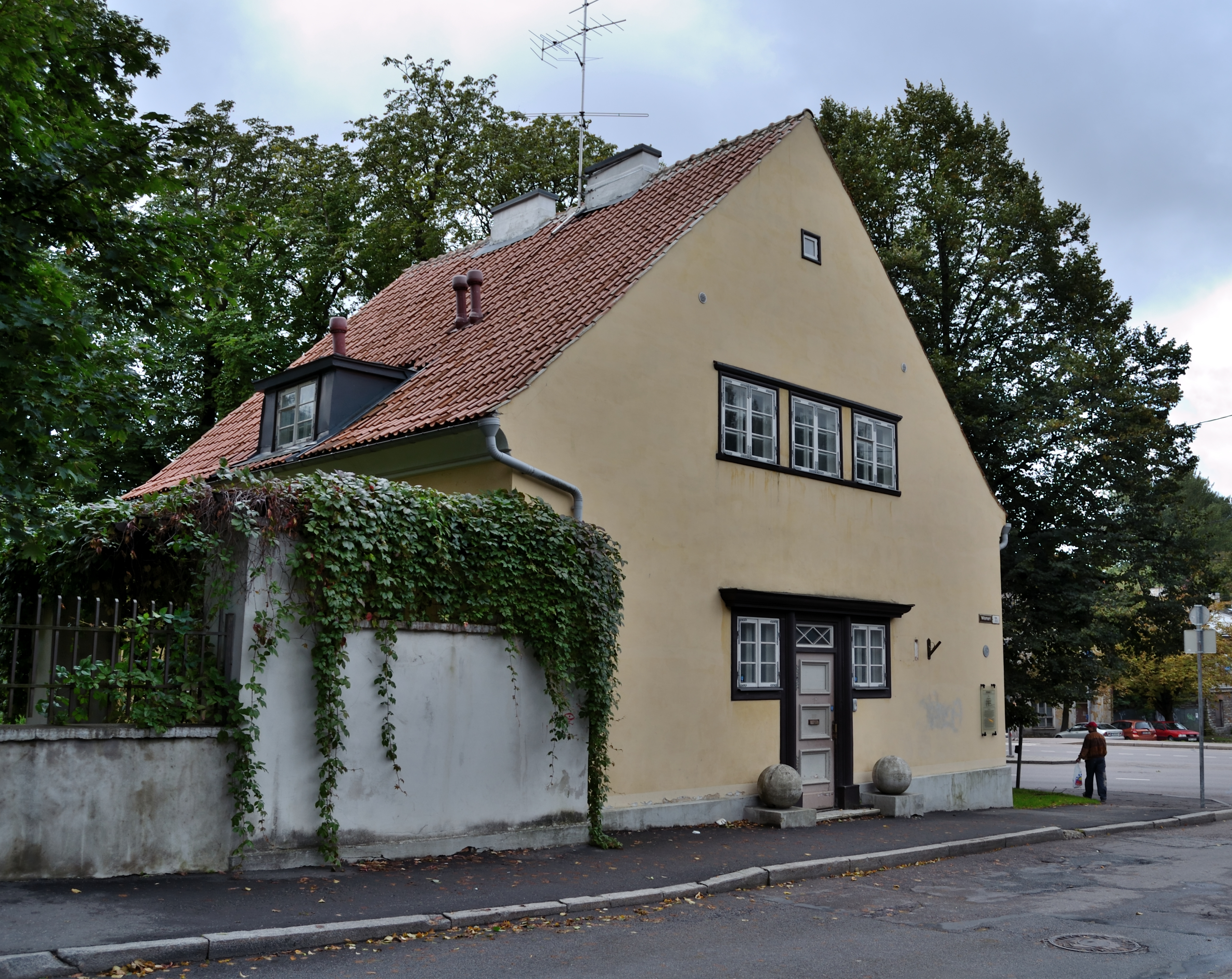 Wismari 11, Tallinn